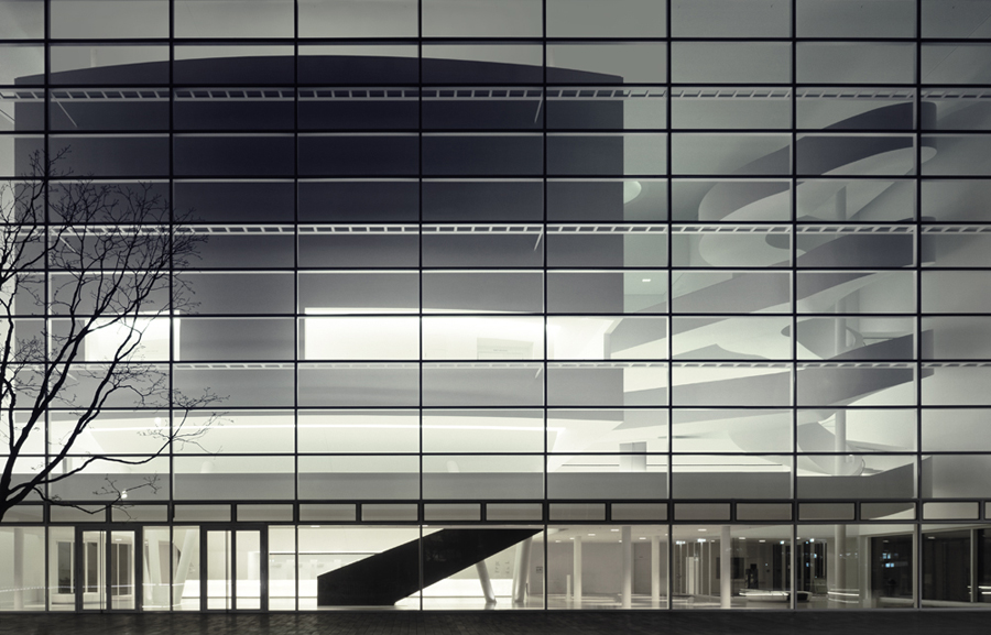 Theater Gütersloh, Südfront bei Nacht